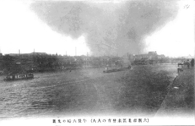 [大阪市北区未曾有の大火] 午後六時の光景